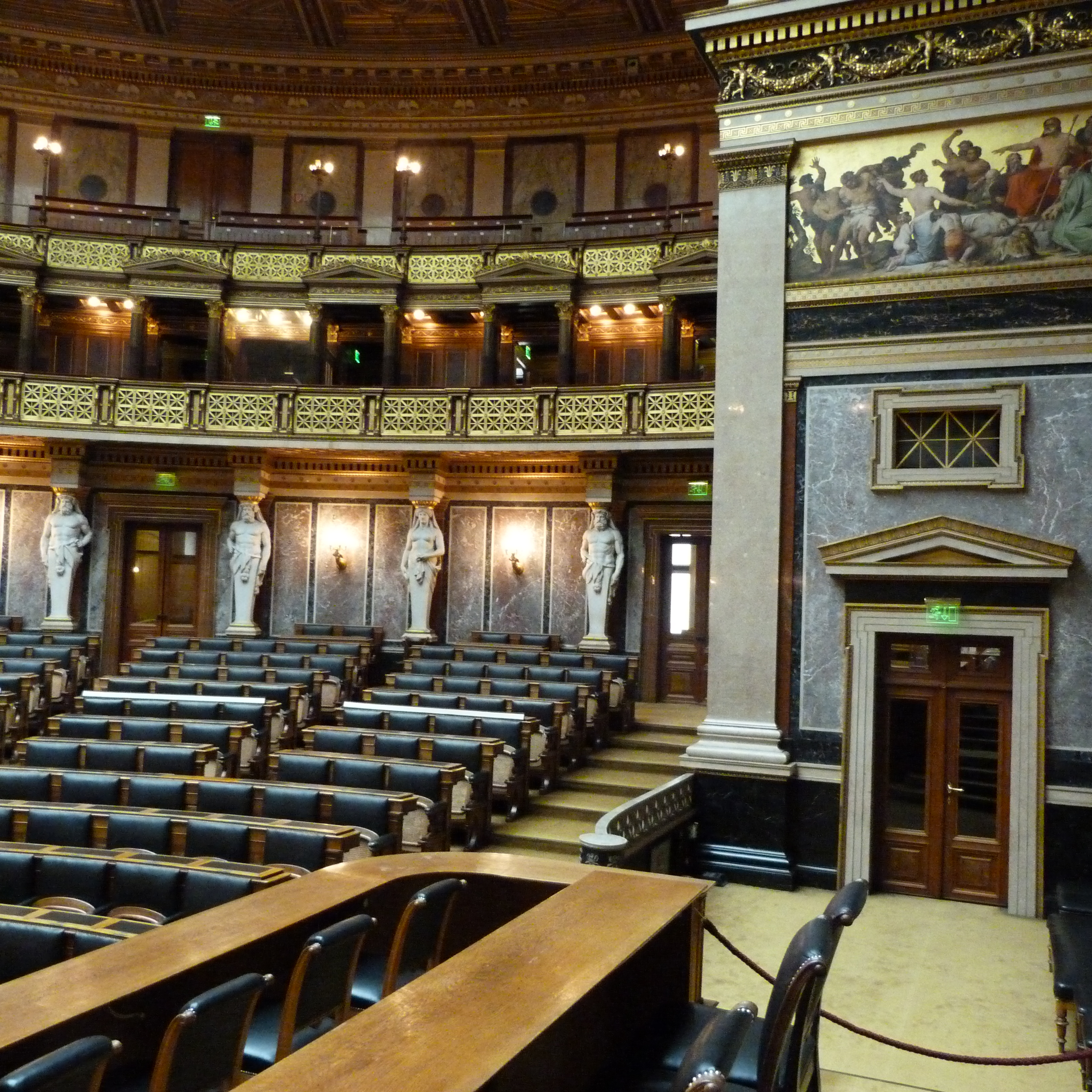 A felvétel 2014. december 3-án, szerdán készült. Bécs, Ausztria. Parlament. ©© Derzsi Elekes Andor, Budapest, 2014, A kép egészben, vagy részletekben másolását, bármilyen úton történő sokszorosítását és felhasználását a szerző ellenérték nélkül, jogutódjaira is kihatóan megengedi. Az engedély kiterjed a kereskedelmi célú hasznosításra is. Kéri azonban nevének feltüntetését a felhasználás során. A Metapolisz sorozat valamennyi képe és filmje Creative Commons alatti valamint kereskedelmi - for profit - célra is felhasználható. Ajánlott hivatkozás: Derzsi Elekes Andor: Metapolisz DVD line